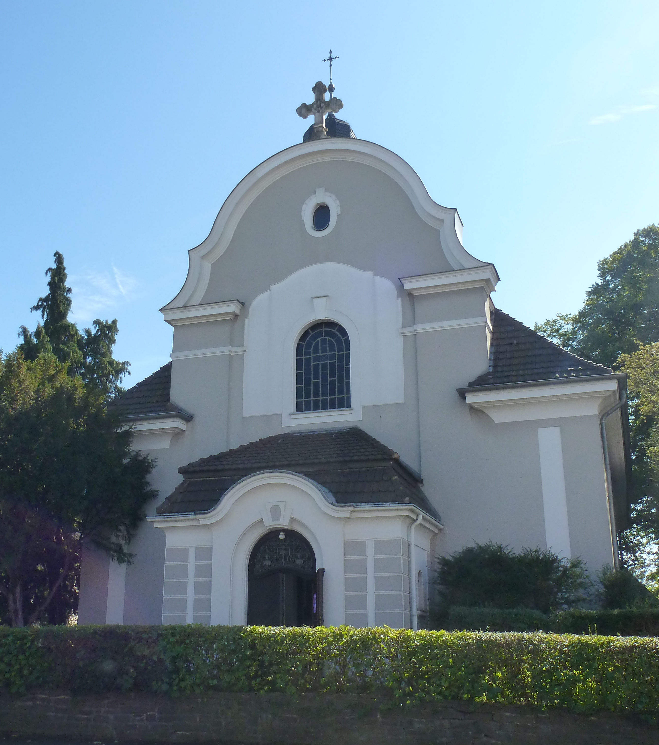 Evang. Christuskirche in Köln-Dellbrück, Denkmal-Nr. 909